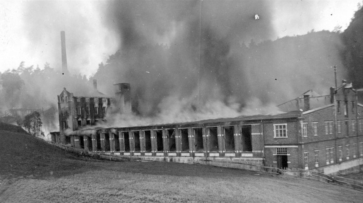 Postkortfotografi av Høie fabrikker i brann 14. oktober 1919.